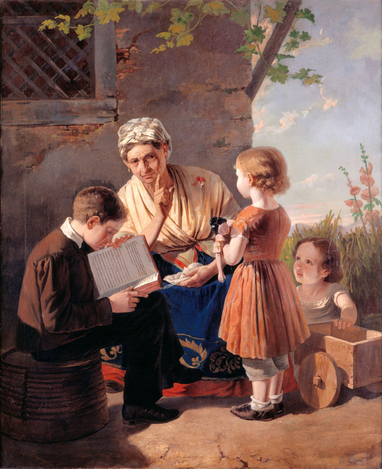 Pintura de costumes